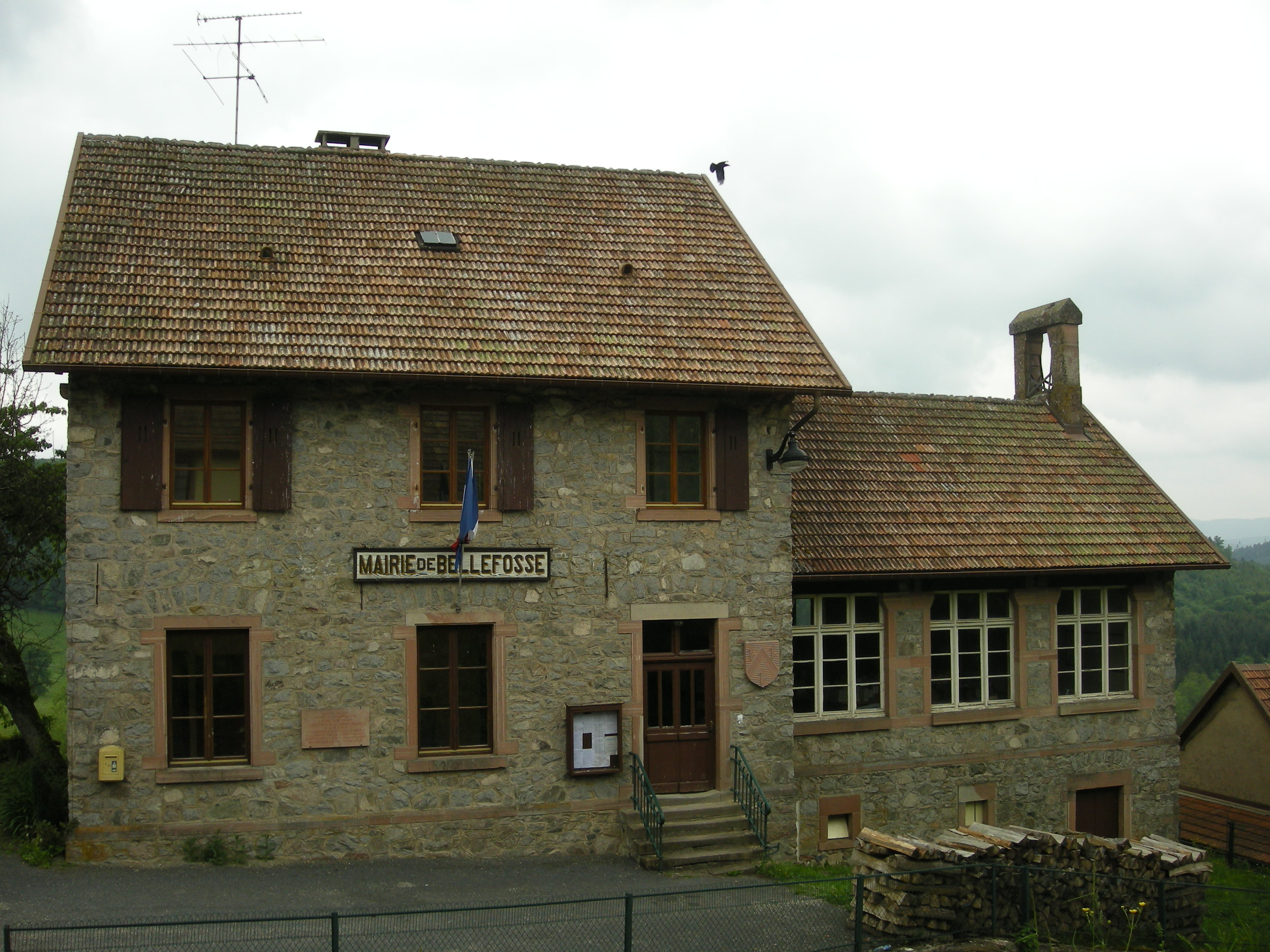 La mairie-école de Bellefosse (Bas-Rhin)